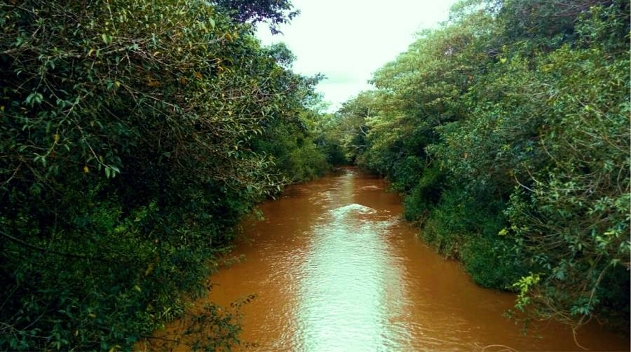 Rio Perdizes, Monte Carmelo (Próximo a fazenda do Sr.Avelino)